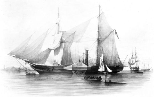 אה"מ גורגון (1837), פריגטת קיטור בצי הבריטי